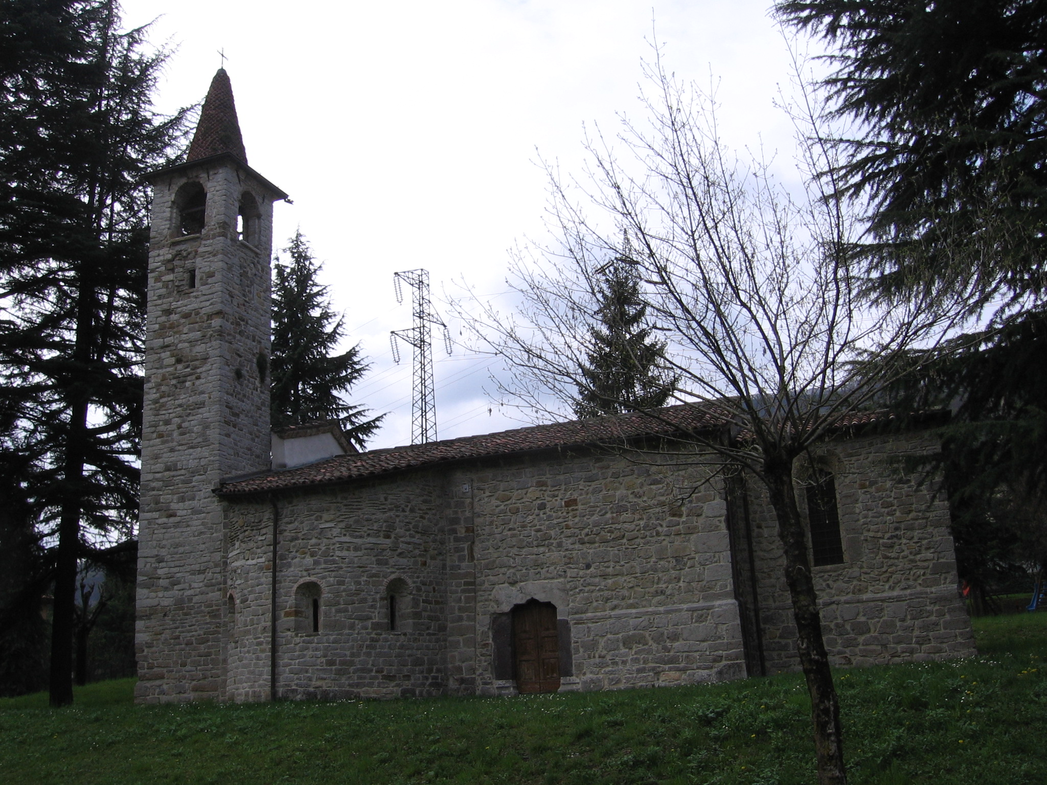 Spinone al lago, Bergamo, Italia